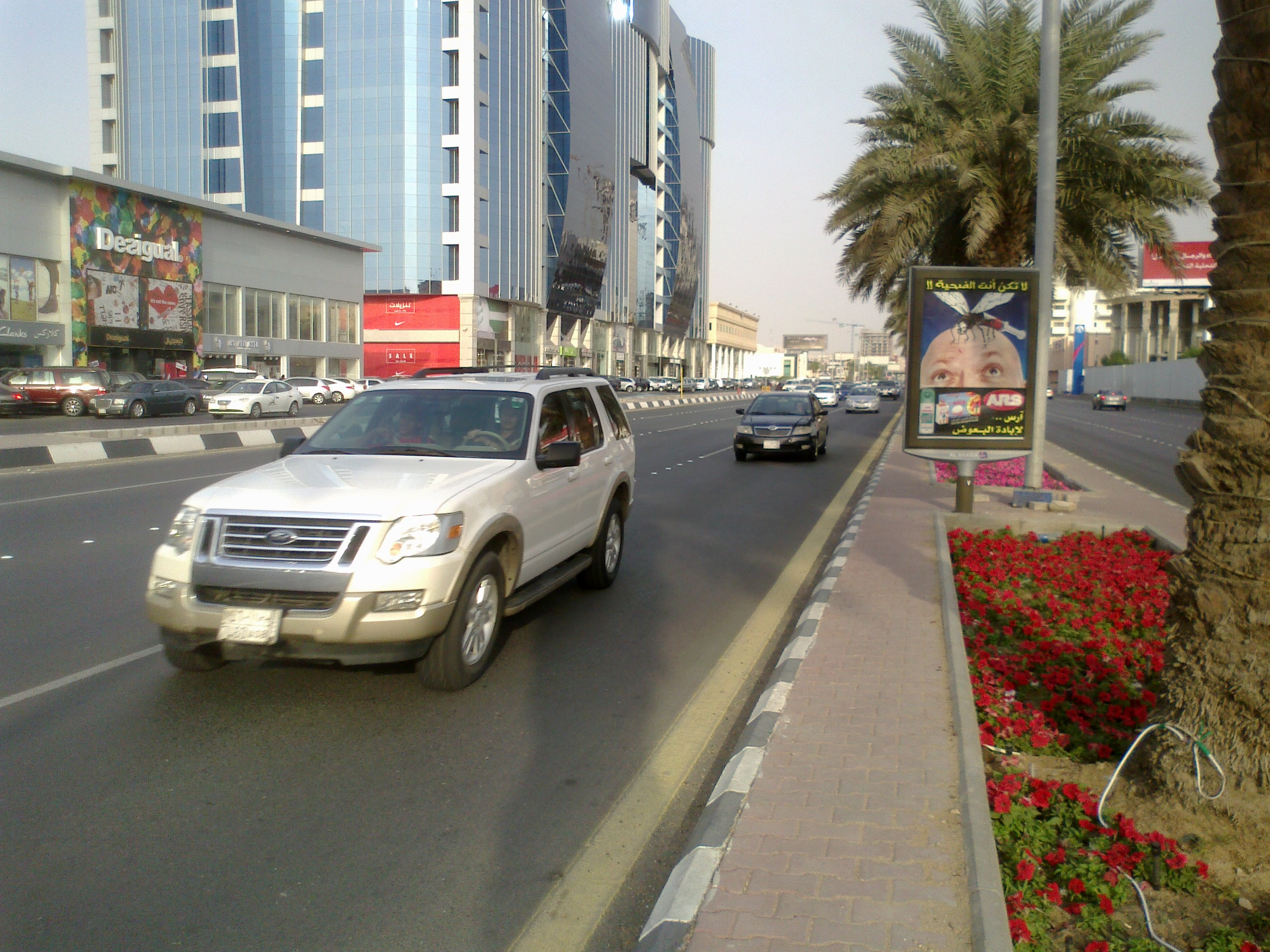 ജിദ്ദയിലെ പ്രധാന ഫാഷൻ വസ്ത്ര വ്യാപാര കേന്ദ്രമായ തഹലിയ തെരുവ്